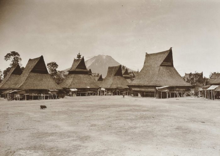 Foto. Traditionele Batakhuizen aan een pleintje in kampong Lingga, Karolanden, Sumatra`s Oostkust